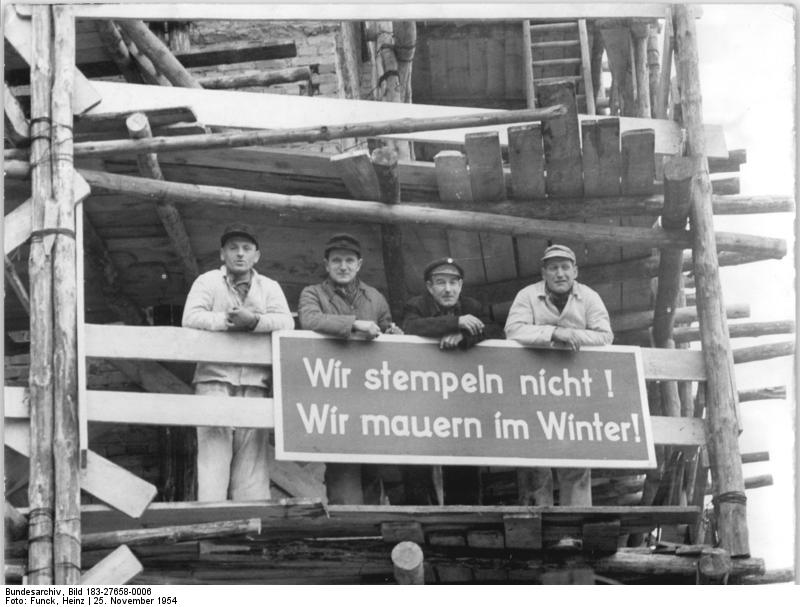 Berlin, Baustelle Weissensee, Bauarbeiter, Plakat Zentralbild Funck He-Qu 6 Mot. 25.11.1954 Winterbau im demokratischen Sektor. Während die Bauarbeiter in den Westsektoren im Winter stempeln müssen, wird im demokratischen Sektor trotz Frost und Kälte weiter gearbeitet. (vlnr) Hucker Erich Schultz, Monteur Willy Moondau, Maschinist Otto Herter und Maurer Willy Wolf auf der Baustelle des VEB Volksbau, Baustelle Weissensee.